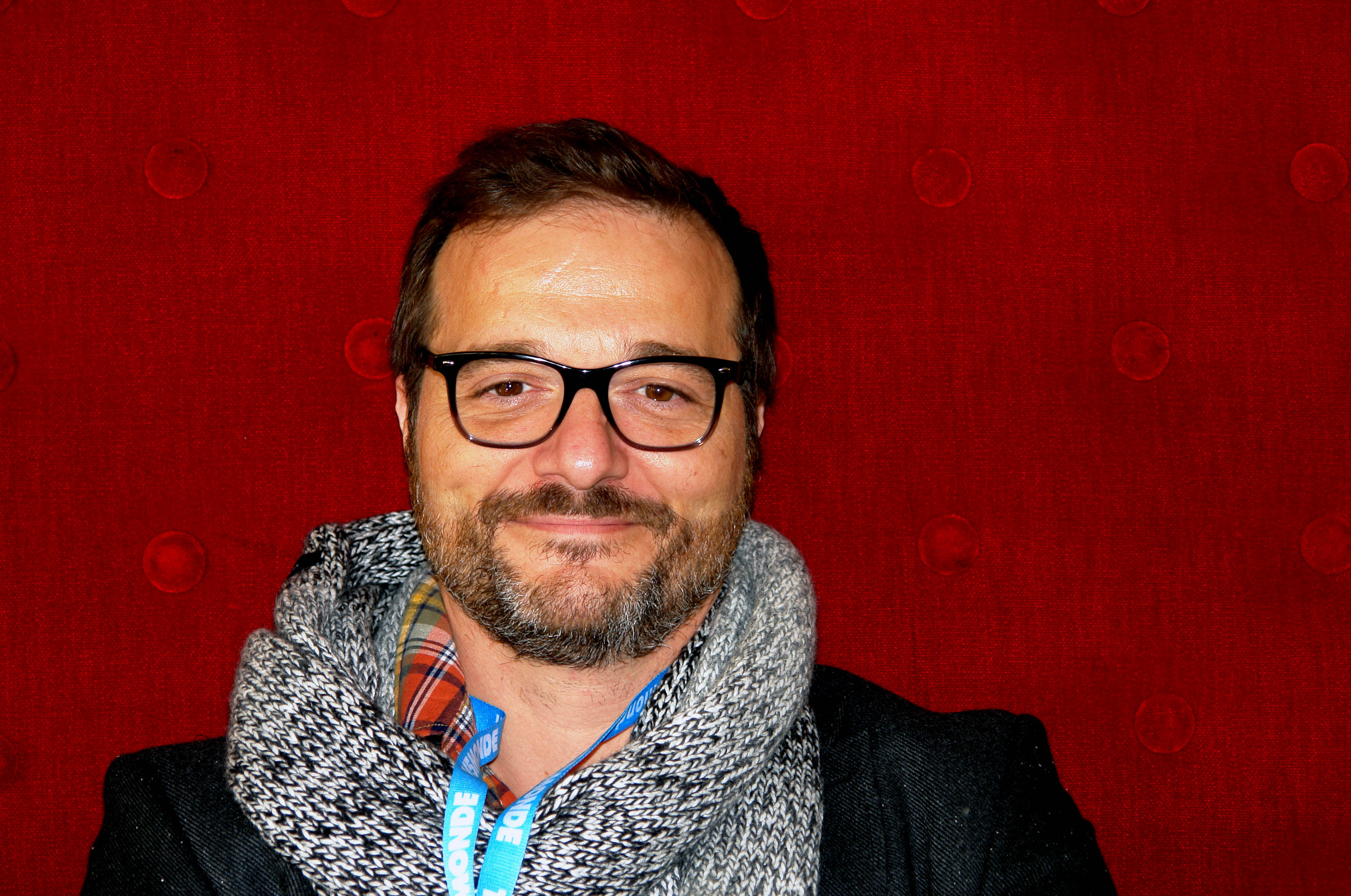 PATRICK RIDREMONT 29 SEPTEMBRE 2012 - Festival international du film francophone de Namur